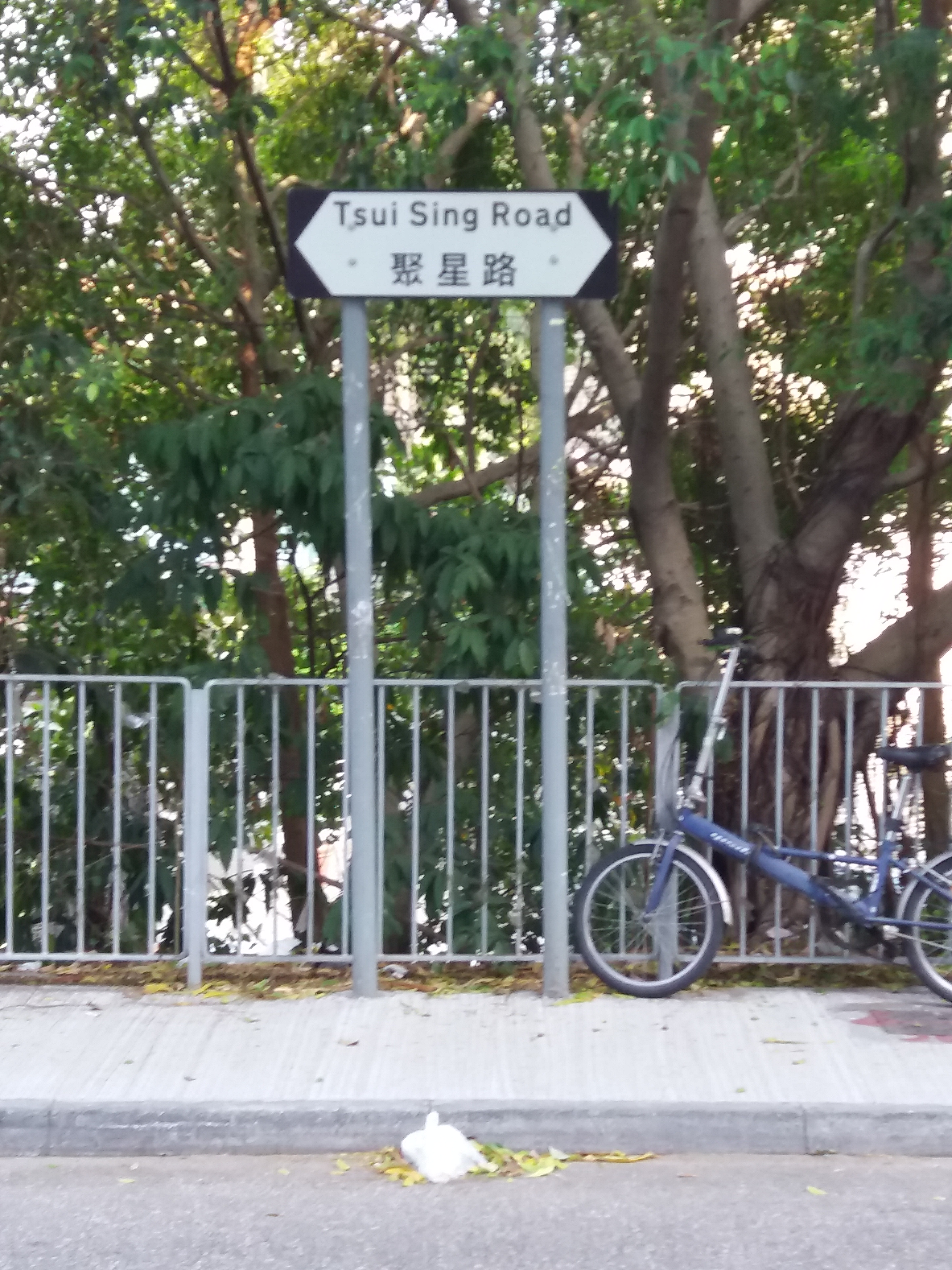 中文（香港）: 聚星路路標